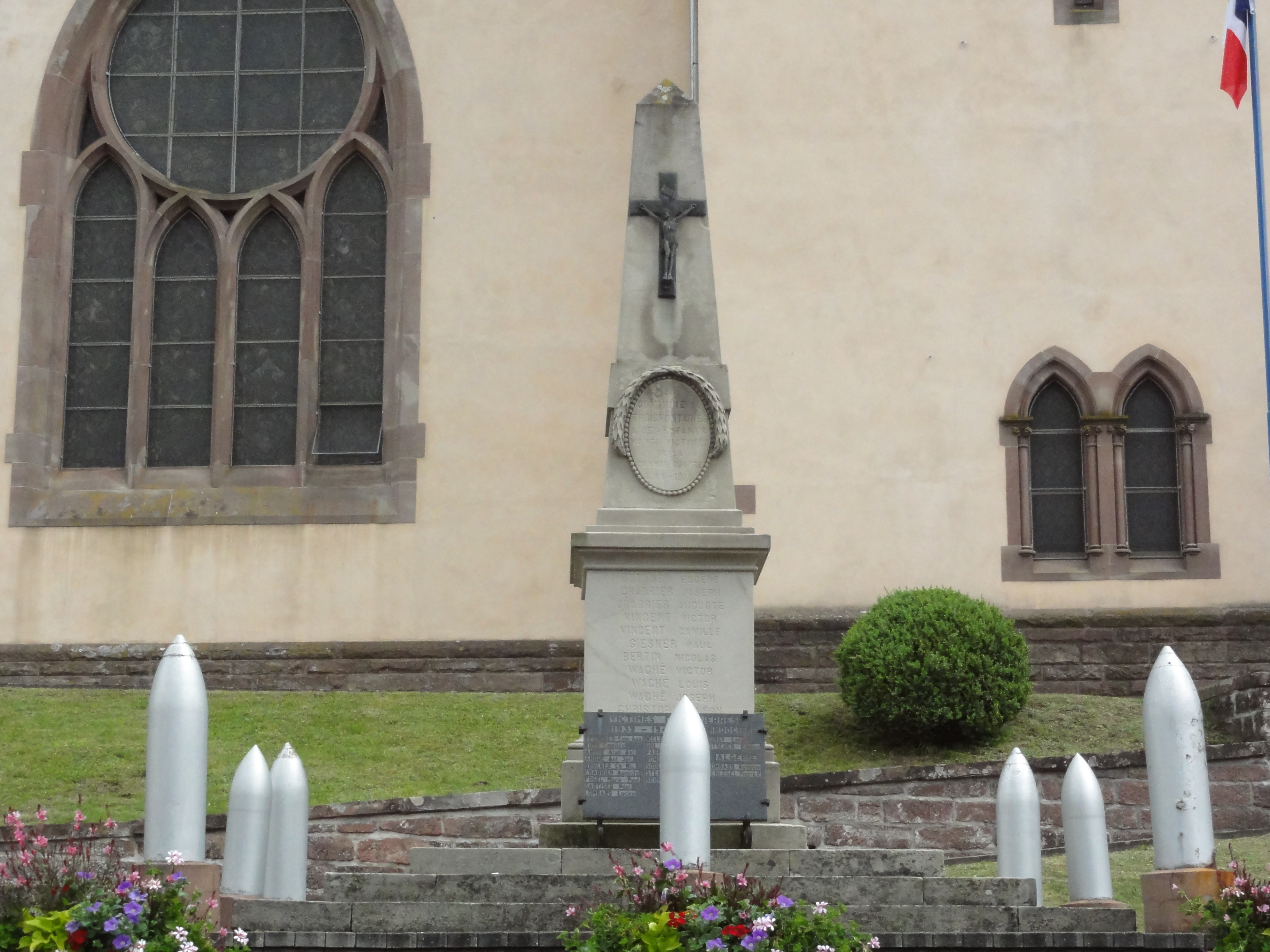 Troisfontaines (Moselle) monument aux morts